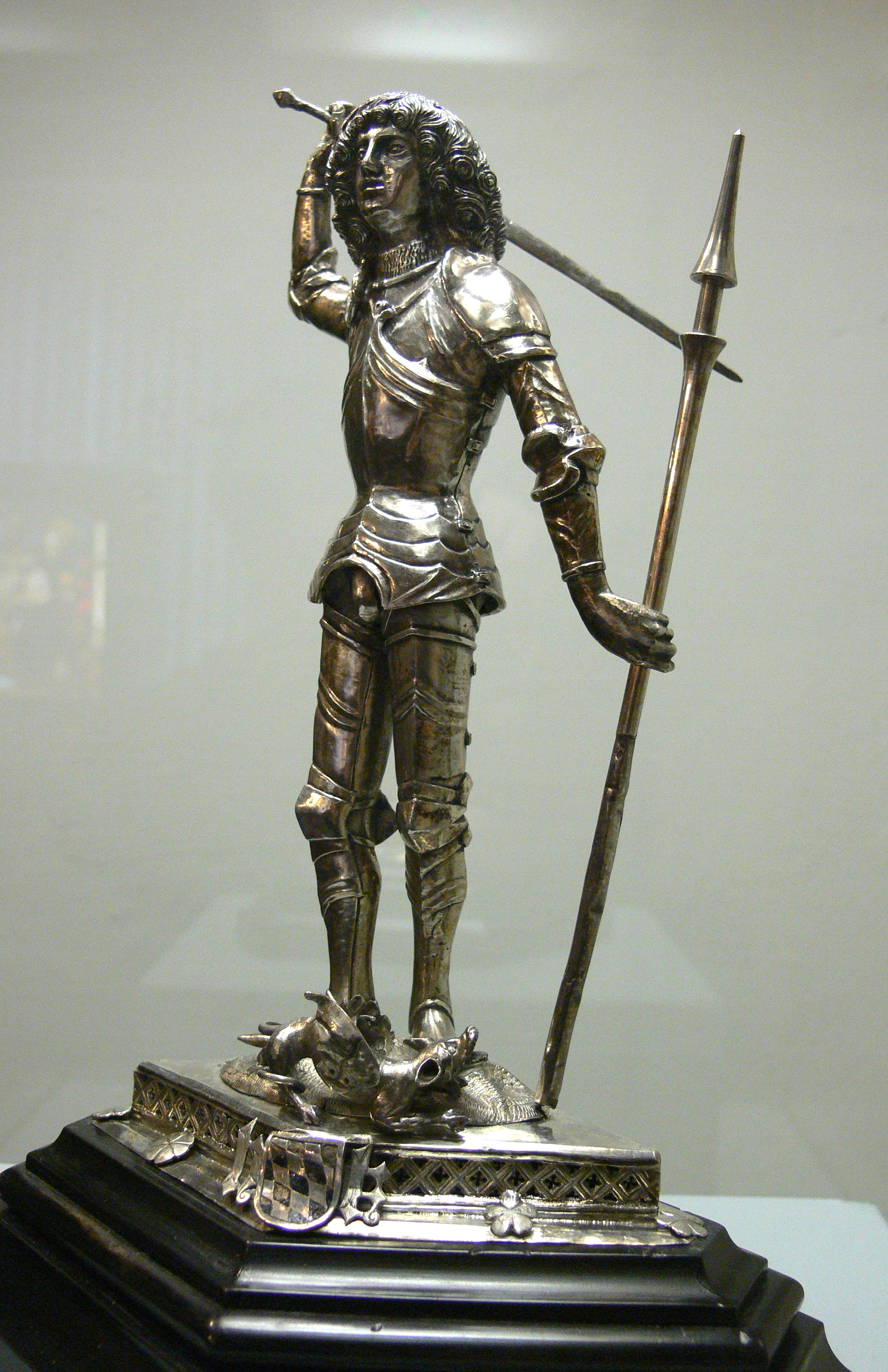 Statuette des hl. Georg, München um 1470/1490 Silber, getrieben, gegossen Bayerisches Nationalmuseum, München; 1857 aus der Sammlung Max Ainmiller; 1. H. 19. Jh. in der Kapelle von Schloss Schleißheim; Inv. Nr. MA1989